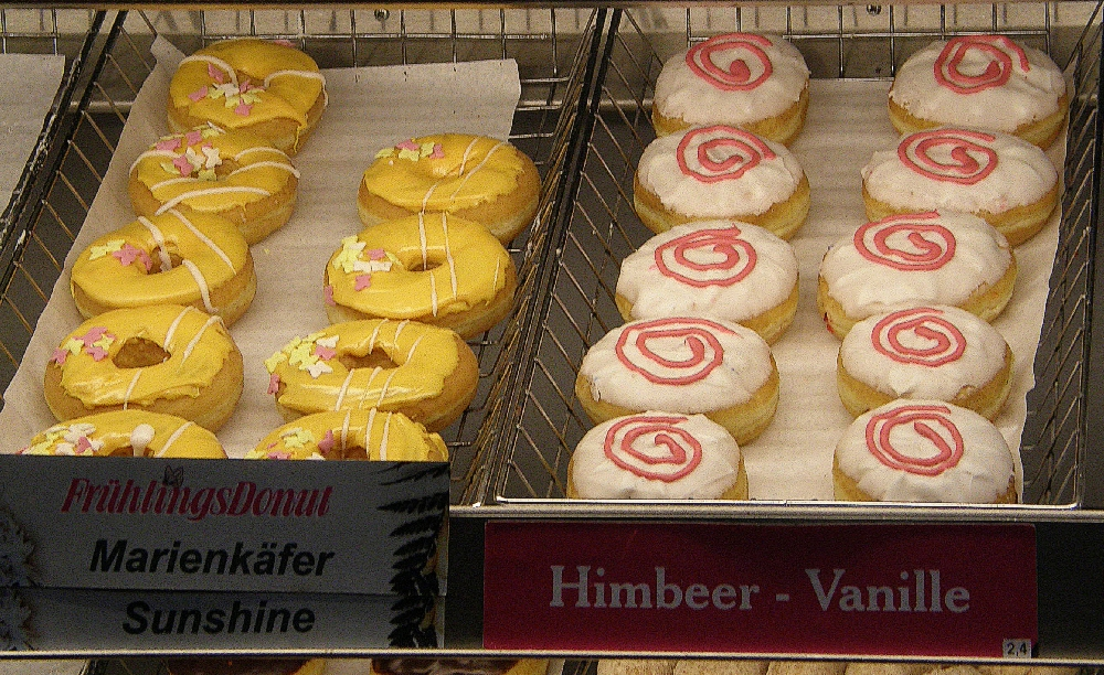 Donutauswahl in Berlin